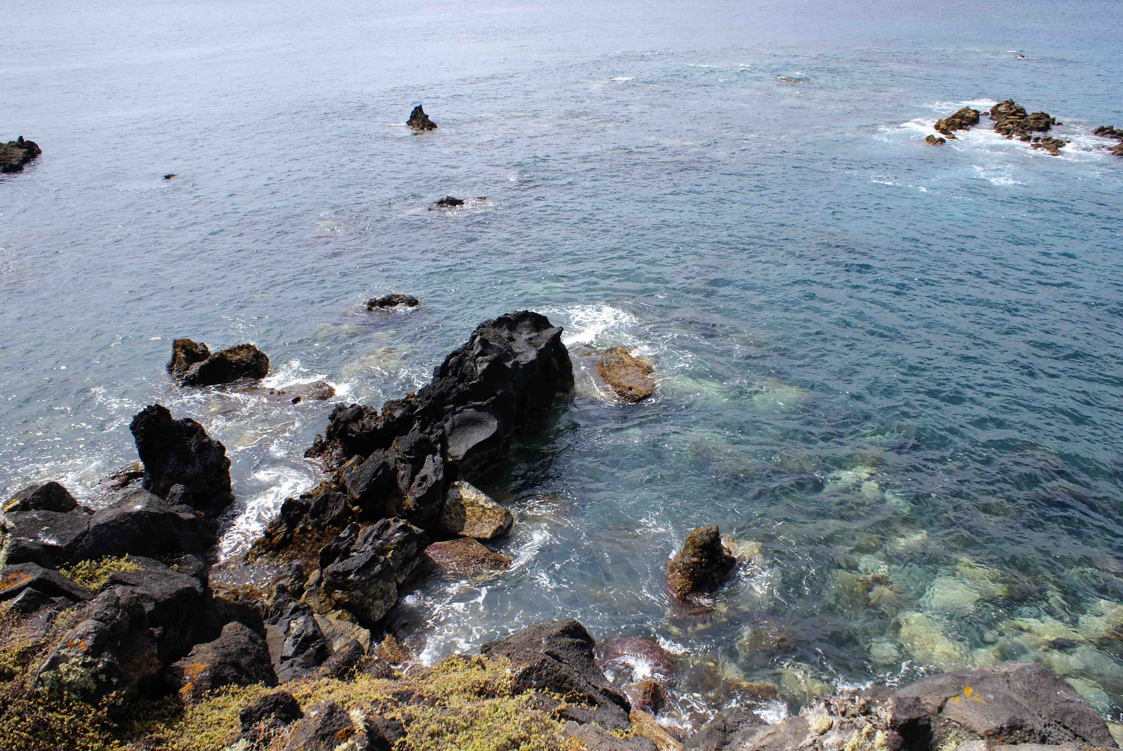 Costa da Baía de Villa Maria, ilha Terceira, Açores, Portugal